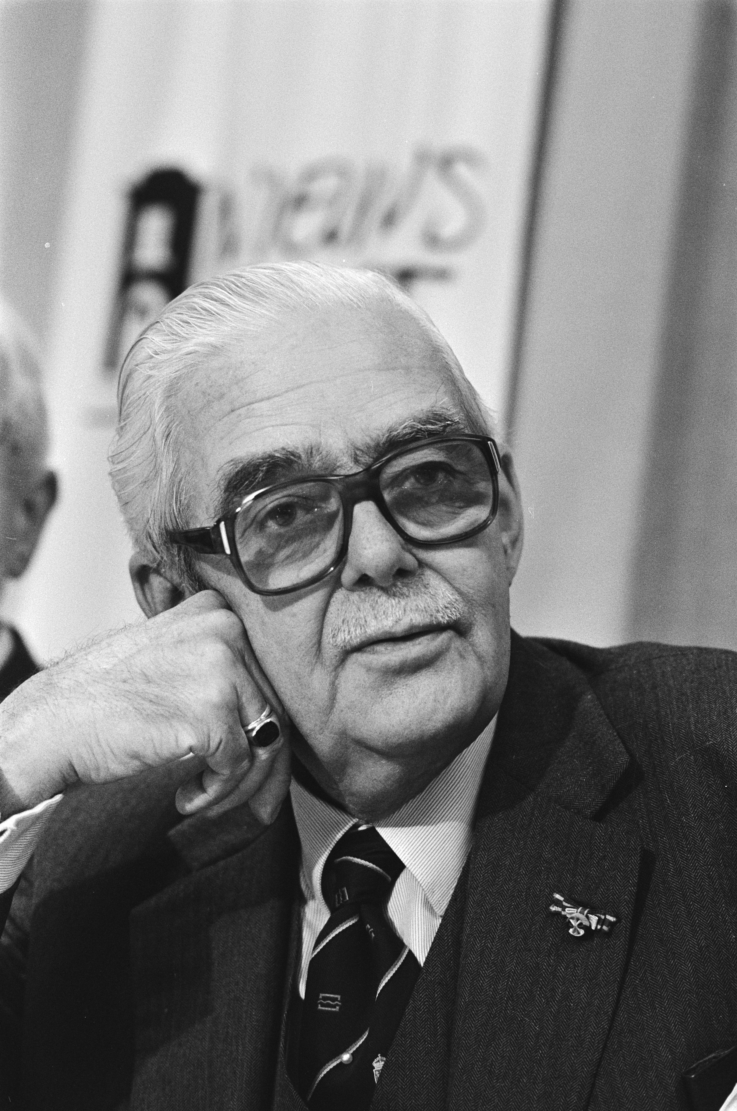 Collectie / Archief : Fotocollectie Anefo Reportage / Serie : [ onbekend ] Beschrijving : Eindadvies over opslag radio-actief afval door voorzitter Geertsema; mr. W. J. Geertsema (kop) Datum : 8 oktober 1985 Trefwoorden : advies, voorzitters Persoonsnaam : Geertsema, W.J. Fotograaf : Bogaerts, Rob / Anefo Auteursrechthebbende : Nationaal Archief Materiaalsoort : Negatief (zwart/wit) Nummer archiefinventaris : bekijk toegang 2.24.01.05 Bestanddeelnummer : 933-4498